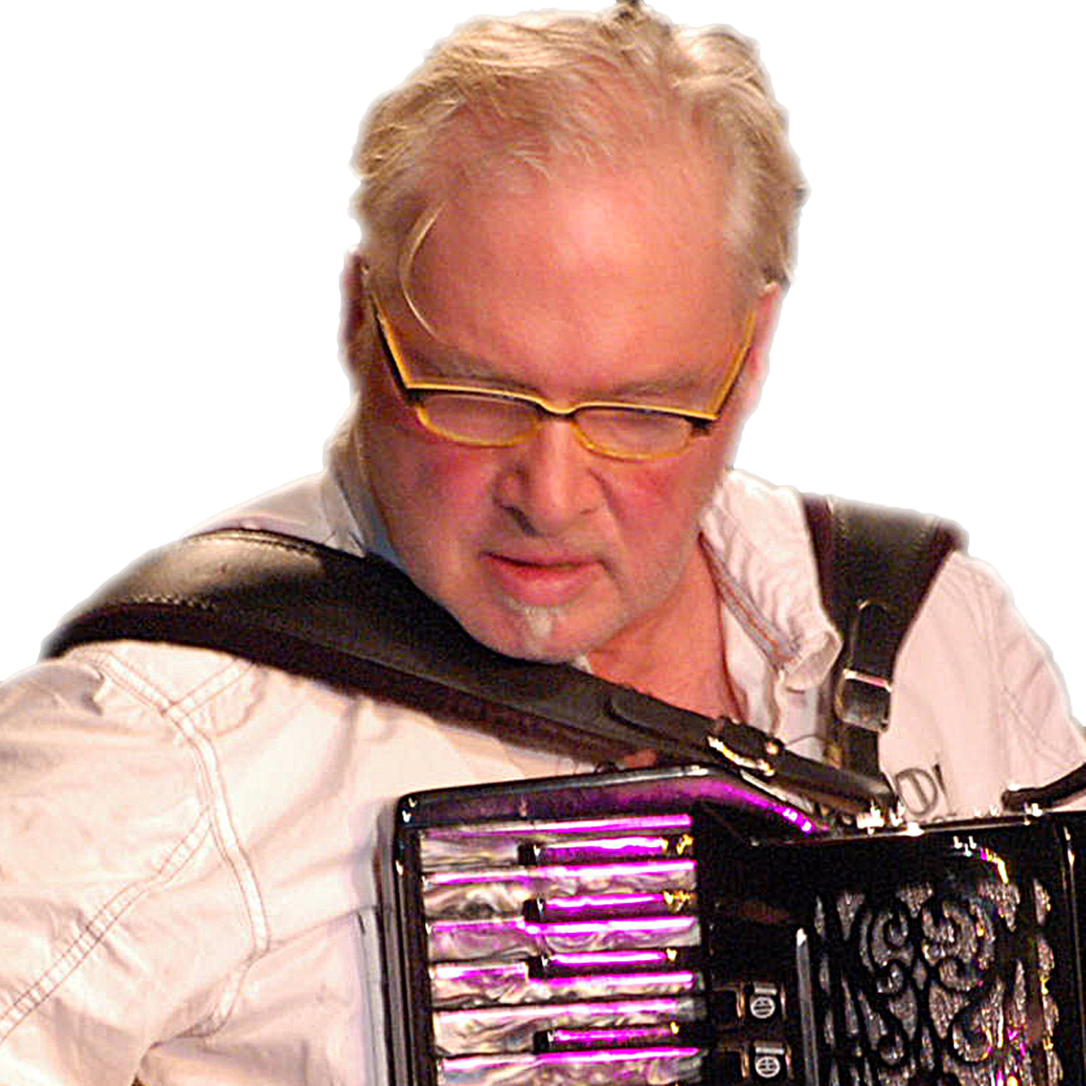 Der Akkordeonist Peter M. Haas bei einem Konzert im Club "Zimmer 16", Berlin, 2014